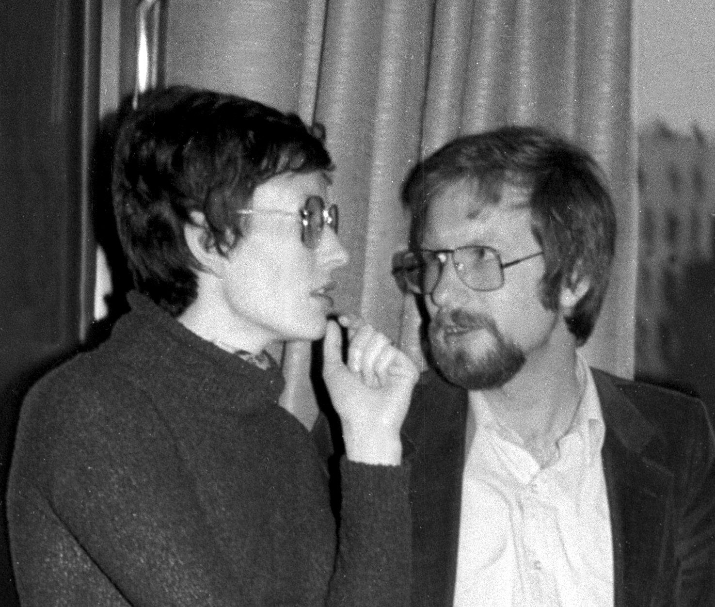 Ehepaar Ulla und Heinz Lohmann, Bürgerschaftsabgeordnete HH und Gesundheitsexperte und Kunstsammler